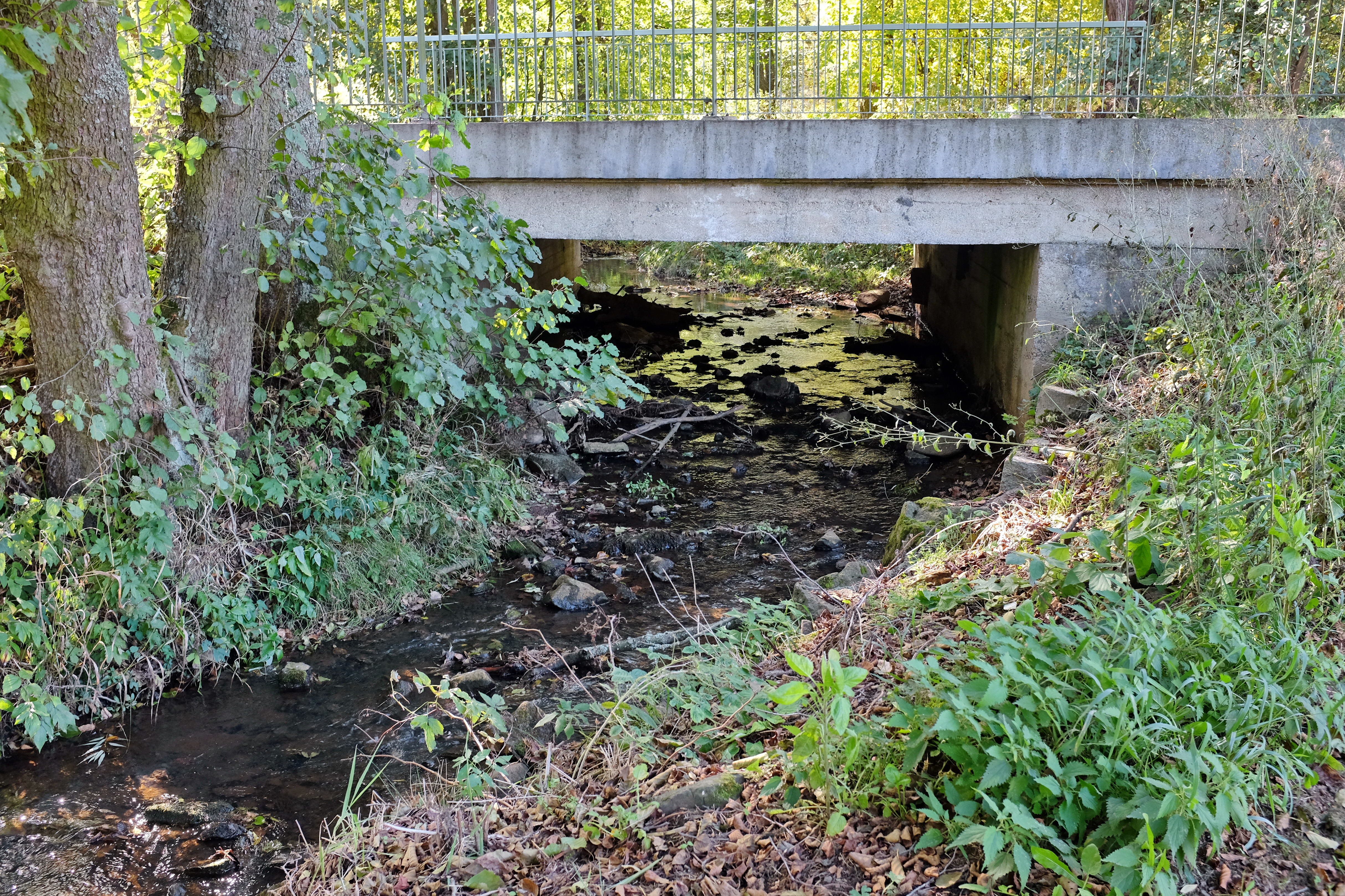 Luční potok v Poutnově, okres Cheb